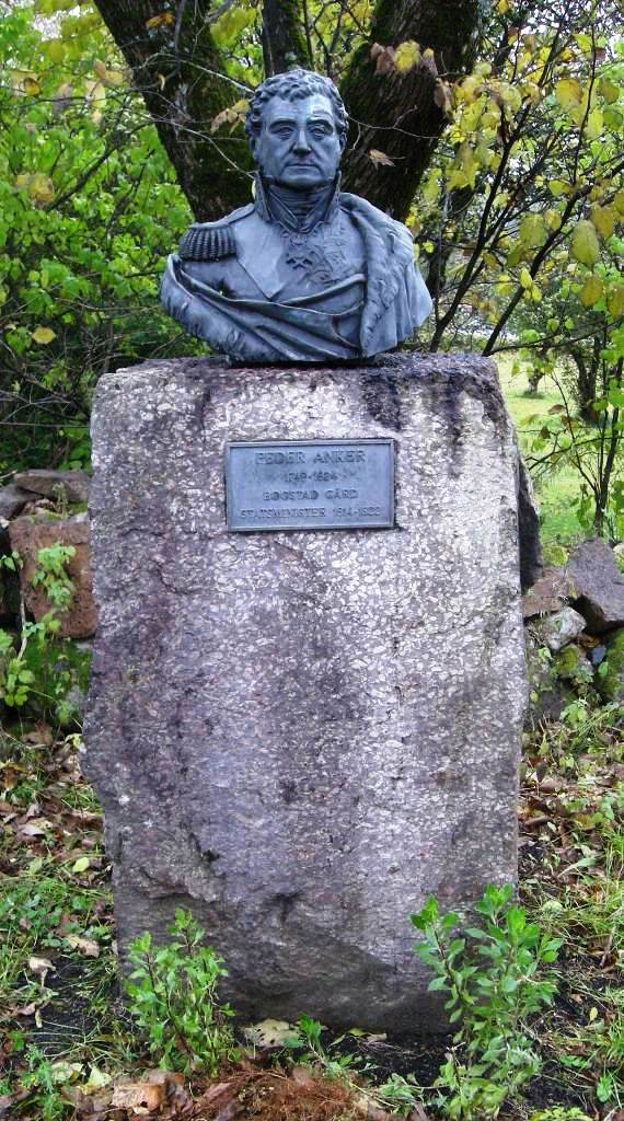 Minnesmerke over Peder Anker på Peder Ankers plass